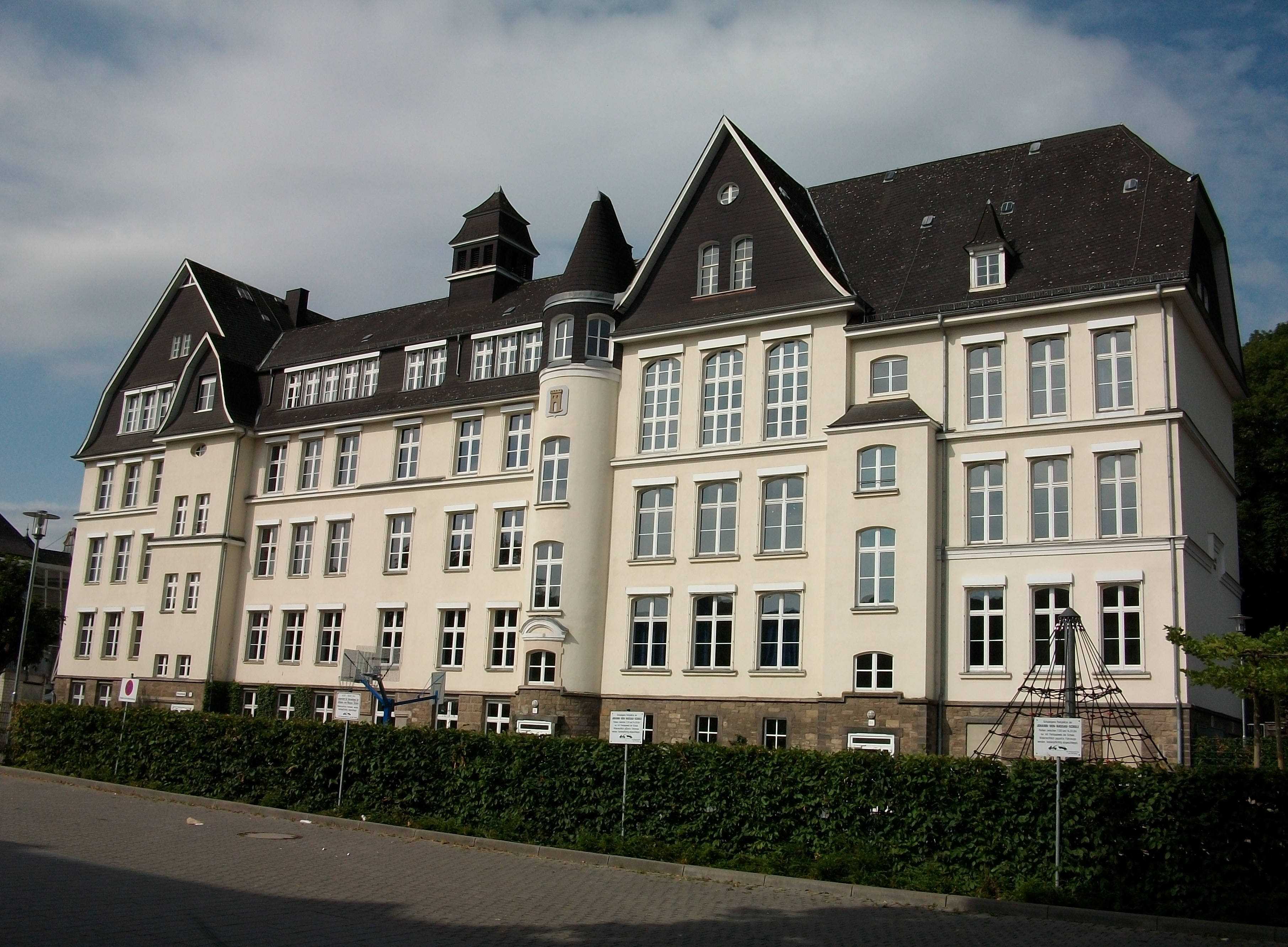 Dillenburg, Johann-von-Nassau-Schule (Germany)